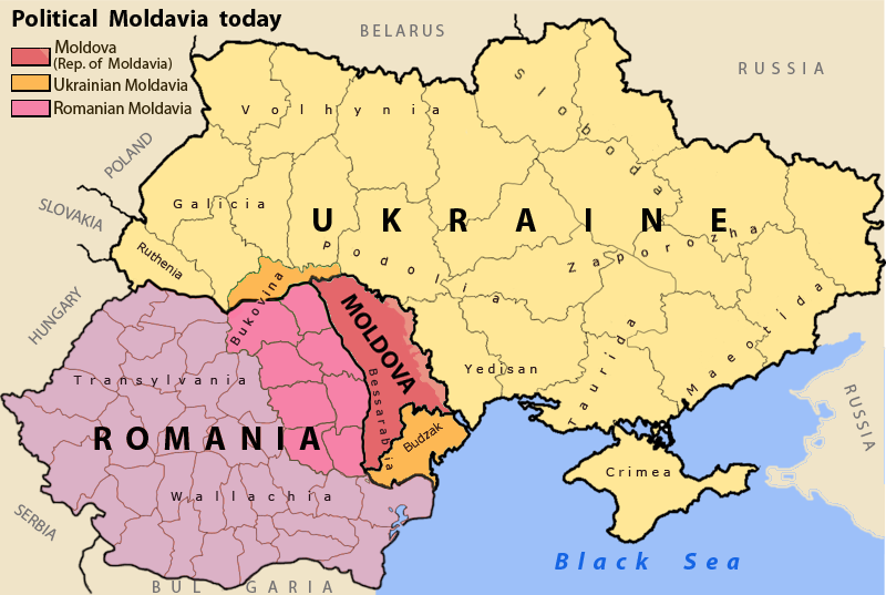 Moldavie : independante, ukrainienne, roumaine.